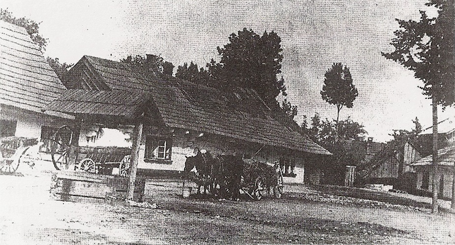 Żywiec, ul. Świętokrzyska, lata 30.